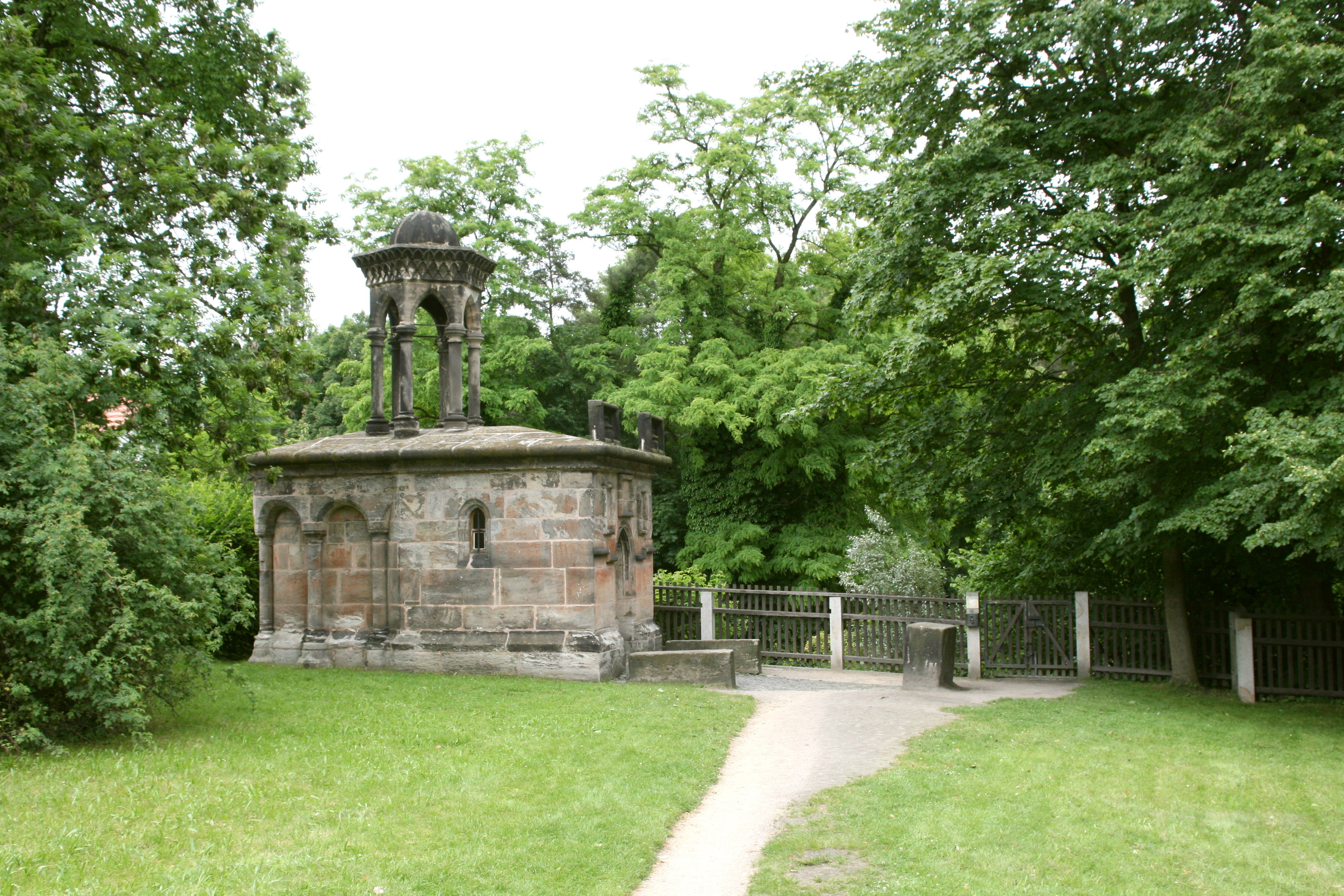 Grabkapelle in der Anlage Heiliges Grab, Heilige-Grab-Straße in Görlitz